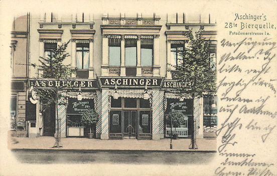 Aschinger's 28te Bierquelle , Potsdamer Straße 1a, Berlin-Tiergarten